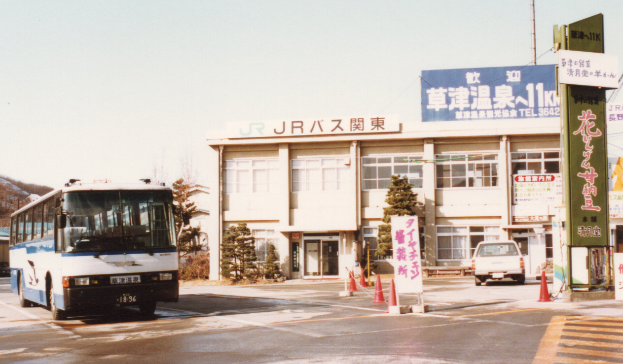 長野原支店